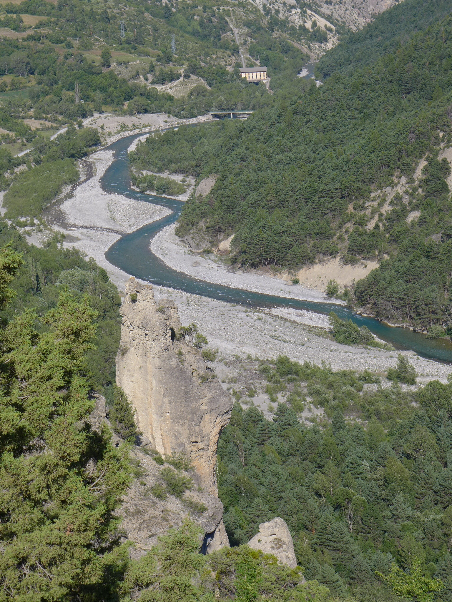 La rivière Le Guil à Mont-Dauphin dans les Hautes-Alpes - France